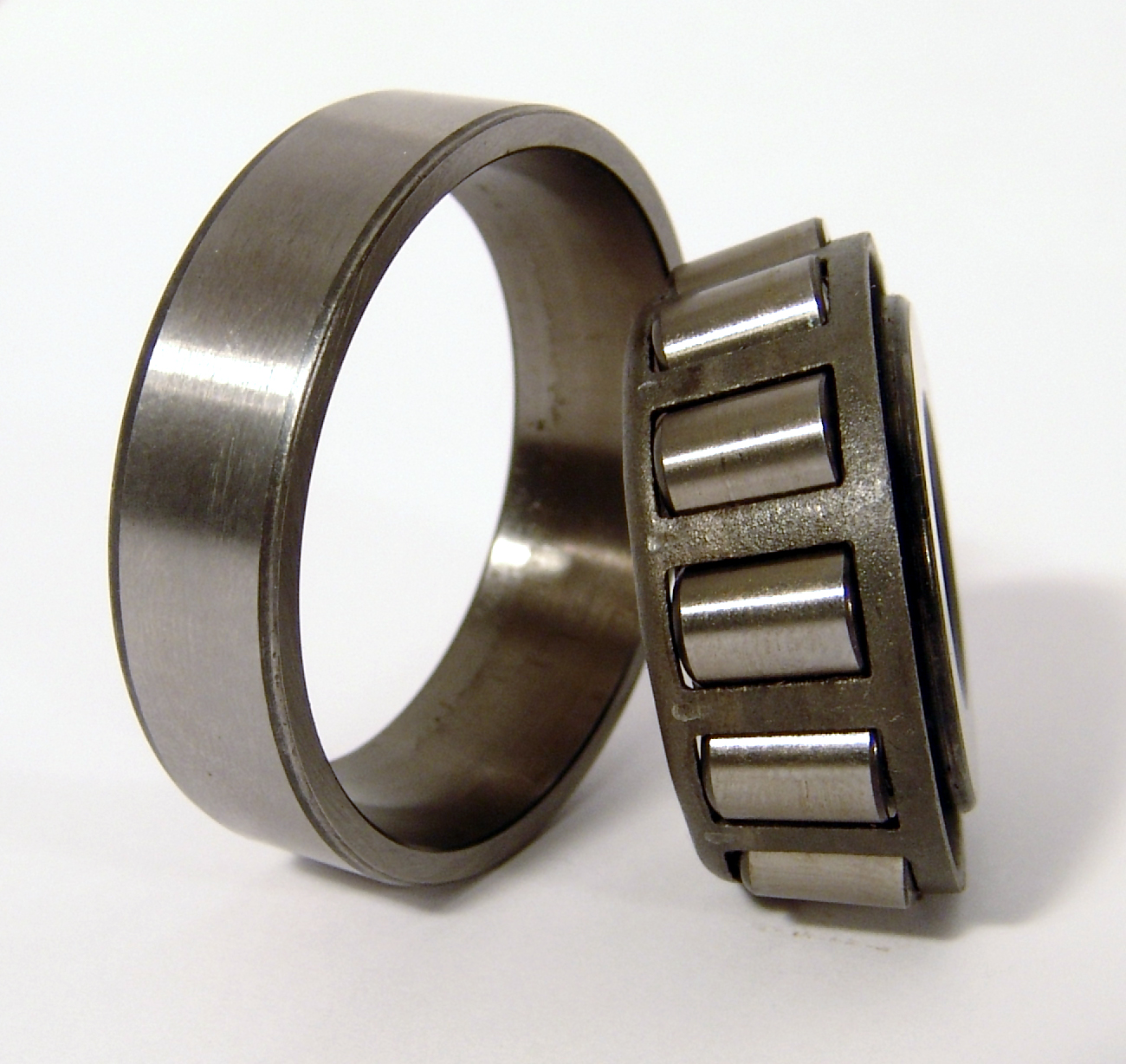 Wälzlager konisch "Steyr 30302 C 18"